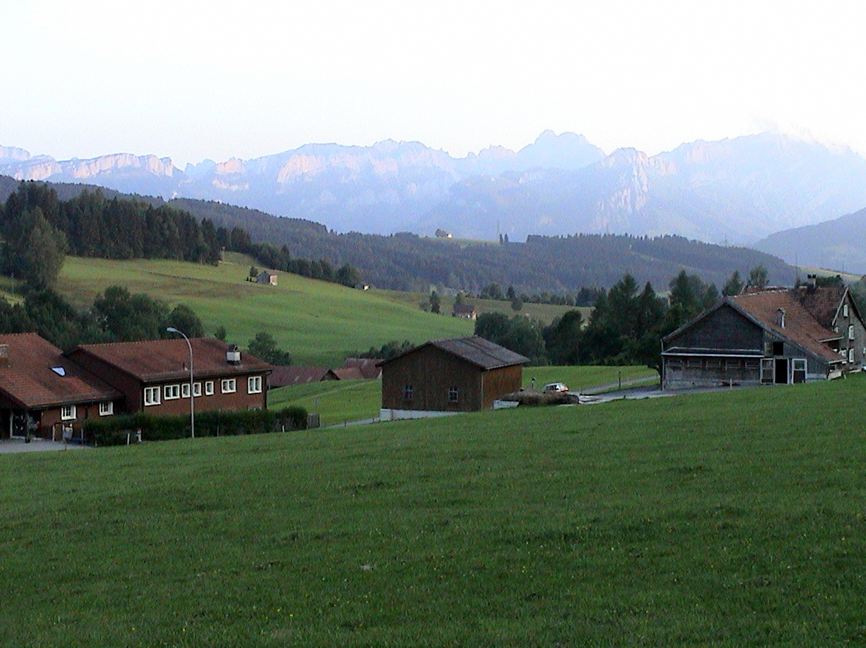 Gais (AR) in Switzerland